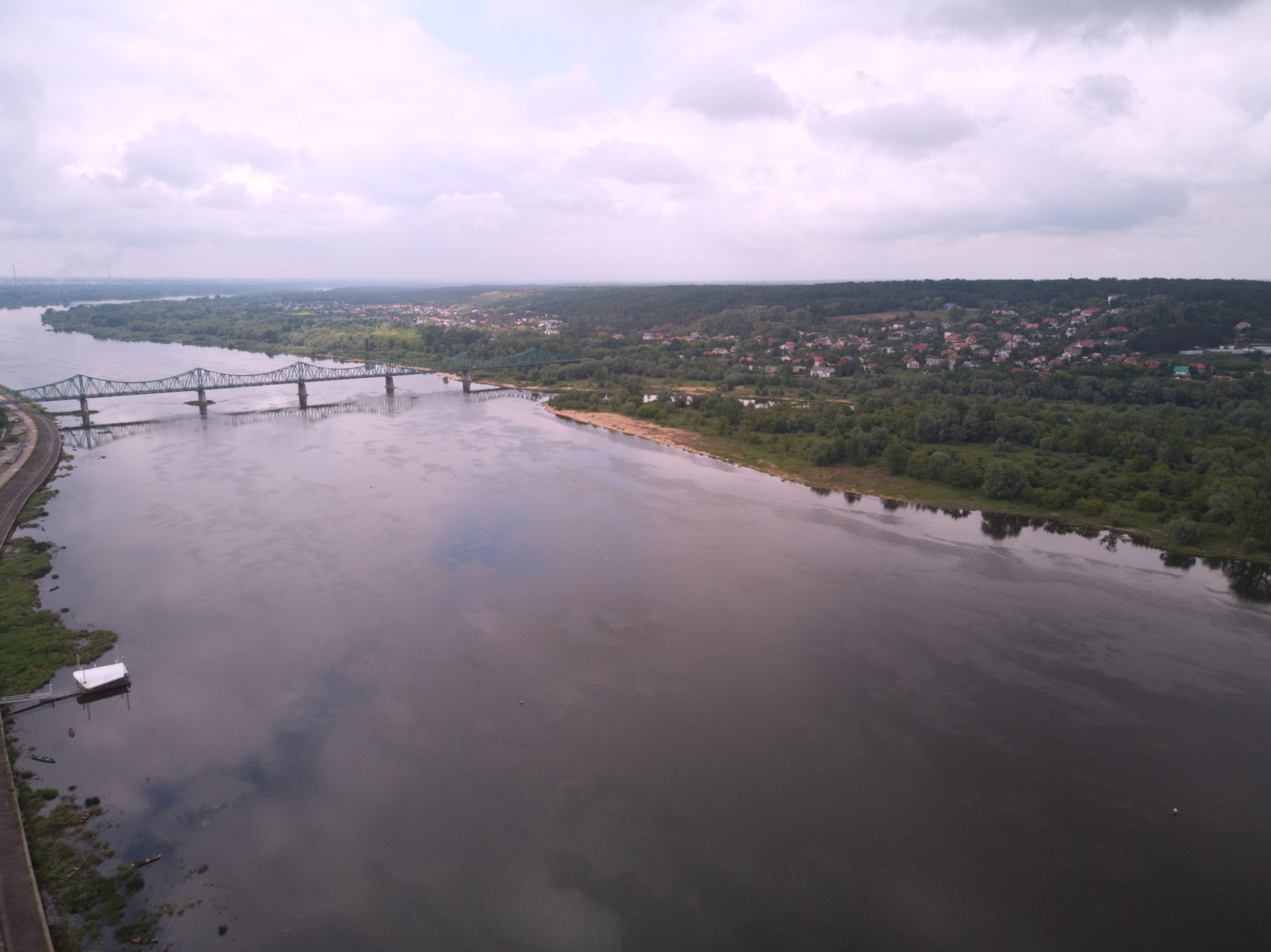 Wisła i Zawiśle (2020 r.)